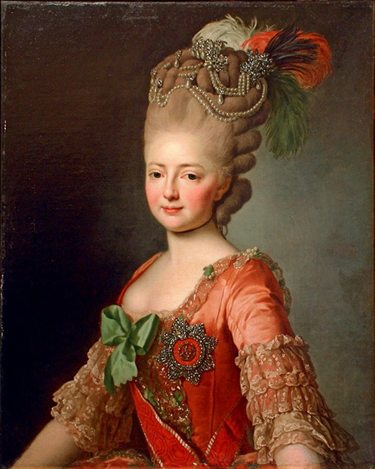 Grand Duchess Maria Fedorovnalabel QS:Len,"Grand Duchess Maria Fedorovna"label QS:Lru,"Мария Федоровна"